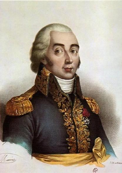 Der französische General Claude François de Malet (1754-1812)